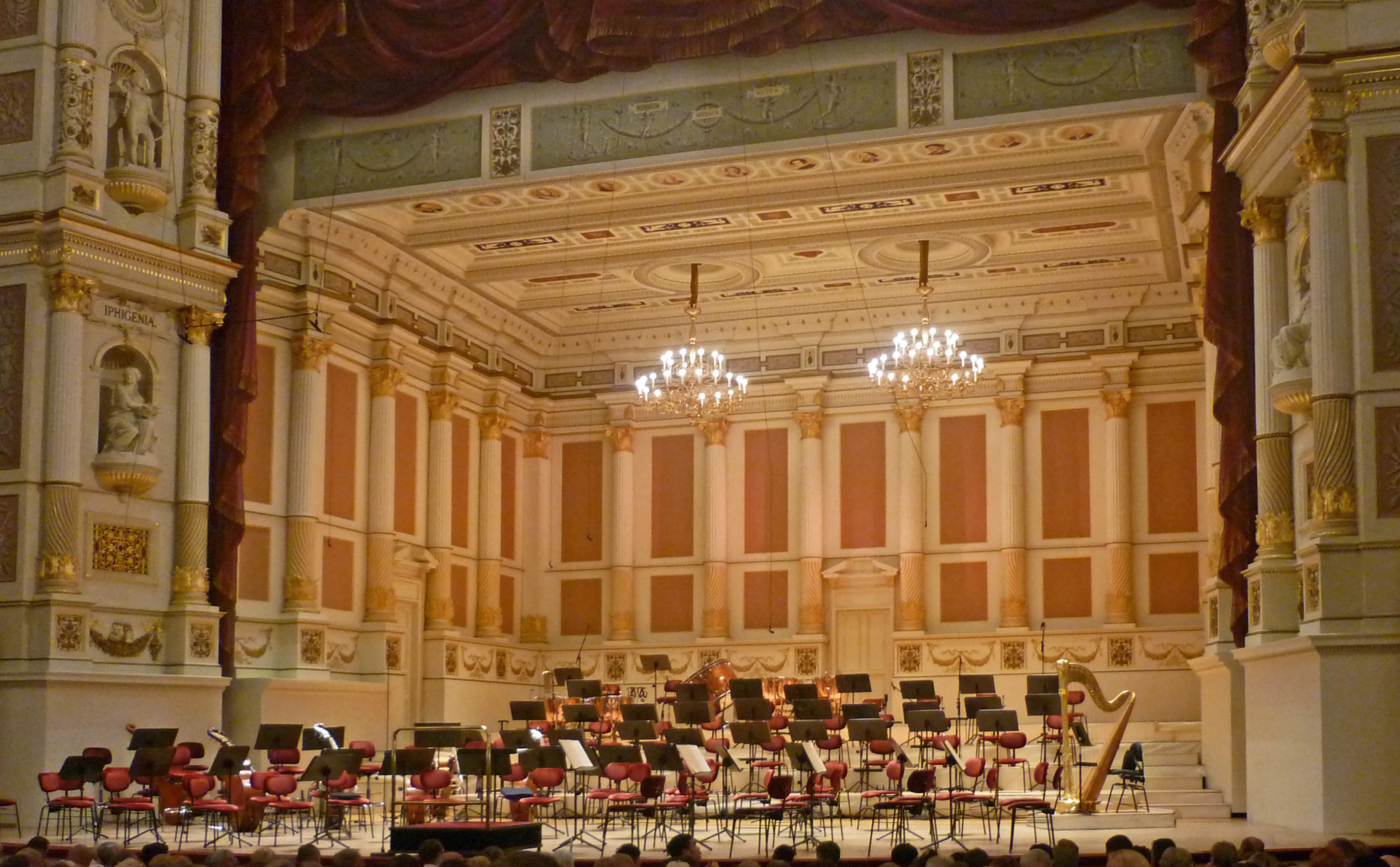 Konzert-Bühnenprospekt, genannt das "Konzertzimmer", in der Semperoper in Dresden. Der Prospekt ist durch Medaillons mit den Köpfen von Musikern und Mäzenen geschmückt. Im Einzelnen sind dies Kurfürst Moritz, Heinrich Schütz, August II., Johann Adolph Hasse, August III., Johann Gottlieb Naumann, Carl Maria von Weber, Gottfried Semper, Richard Wagner, Ernst von Schuch und Richard Strauss. An der Vorderfront stehen die Namen: Ernst von Schuch – Nikolaus Graf von Seebach – Fritz Busch.